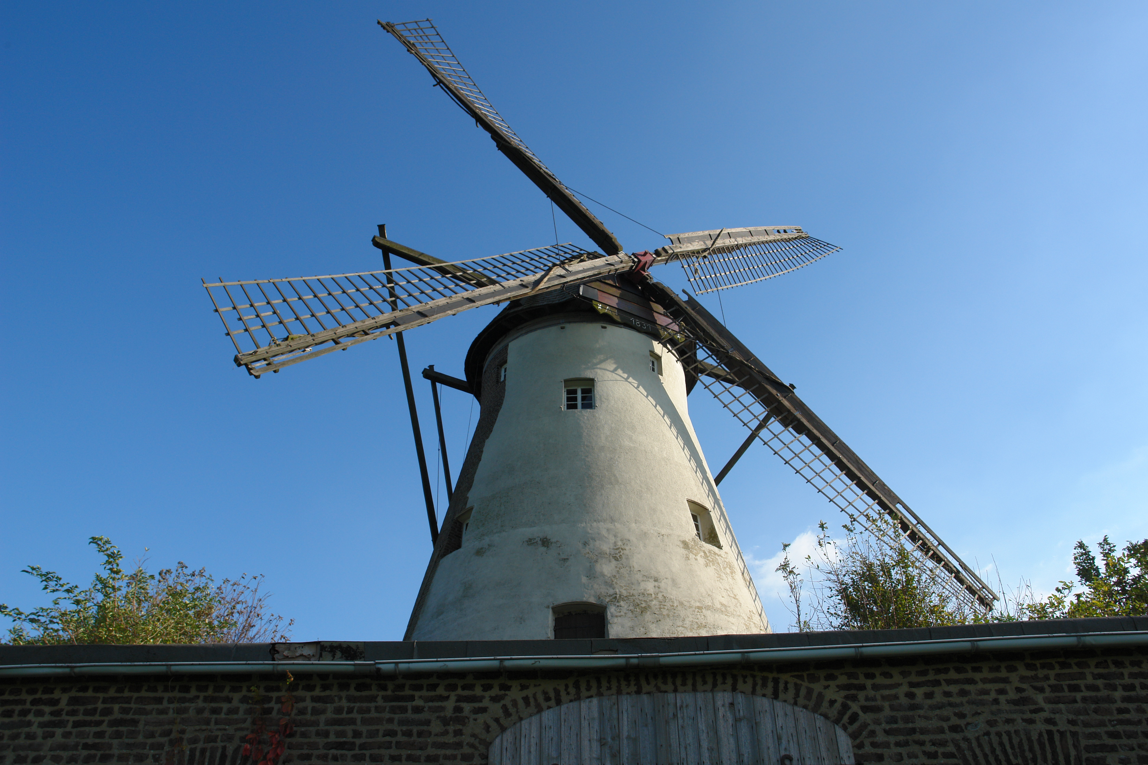 Grottenhertener Turmwindmühle